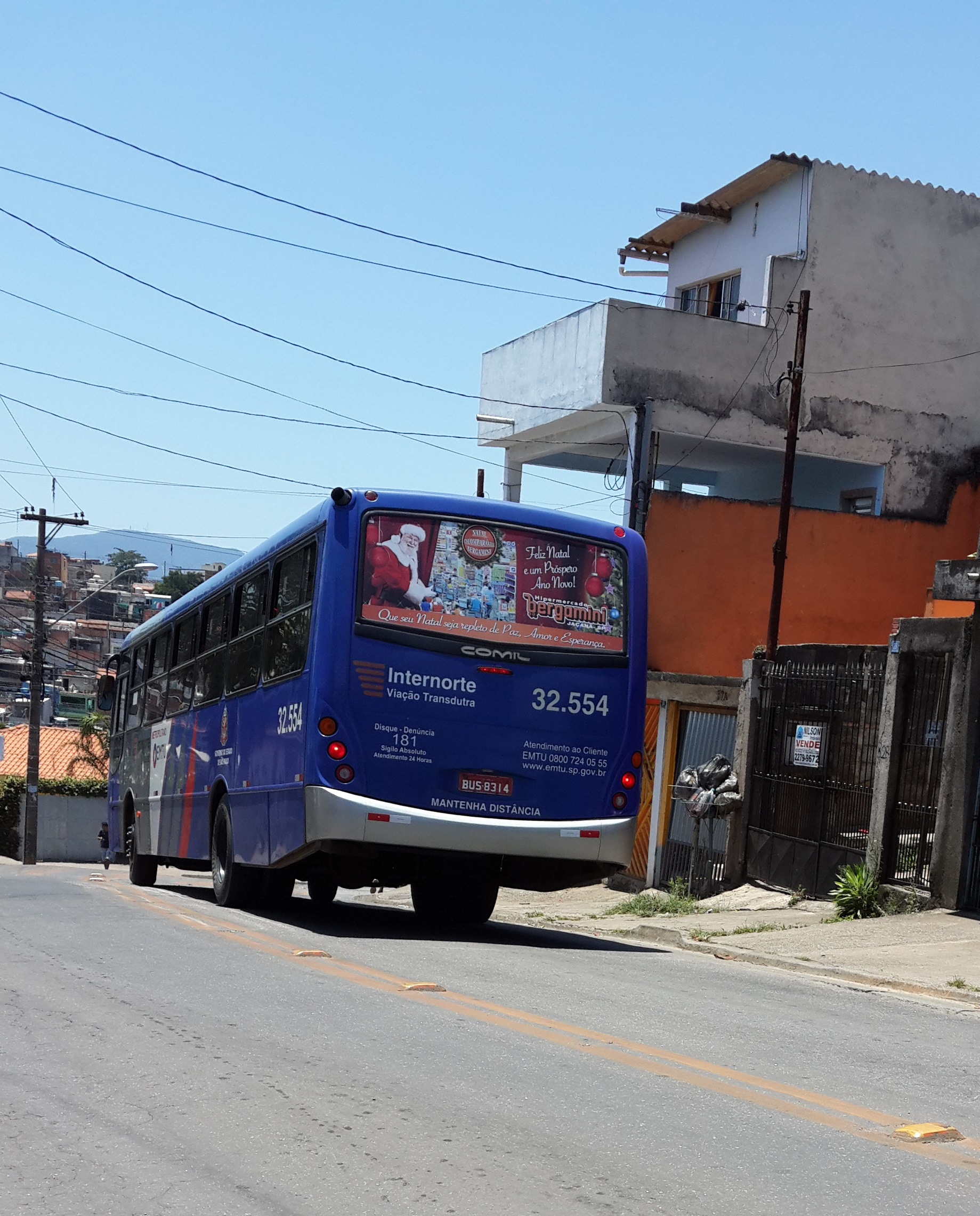 Comil Svelto da Viação Transdutra no bairro do Bonsucesso em Guarulhos - SP.